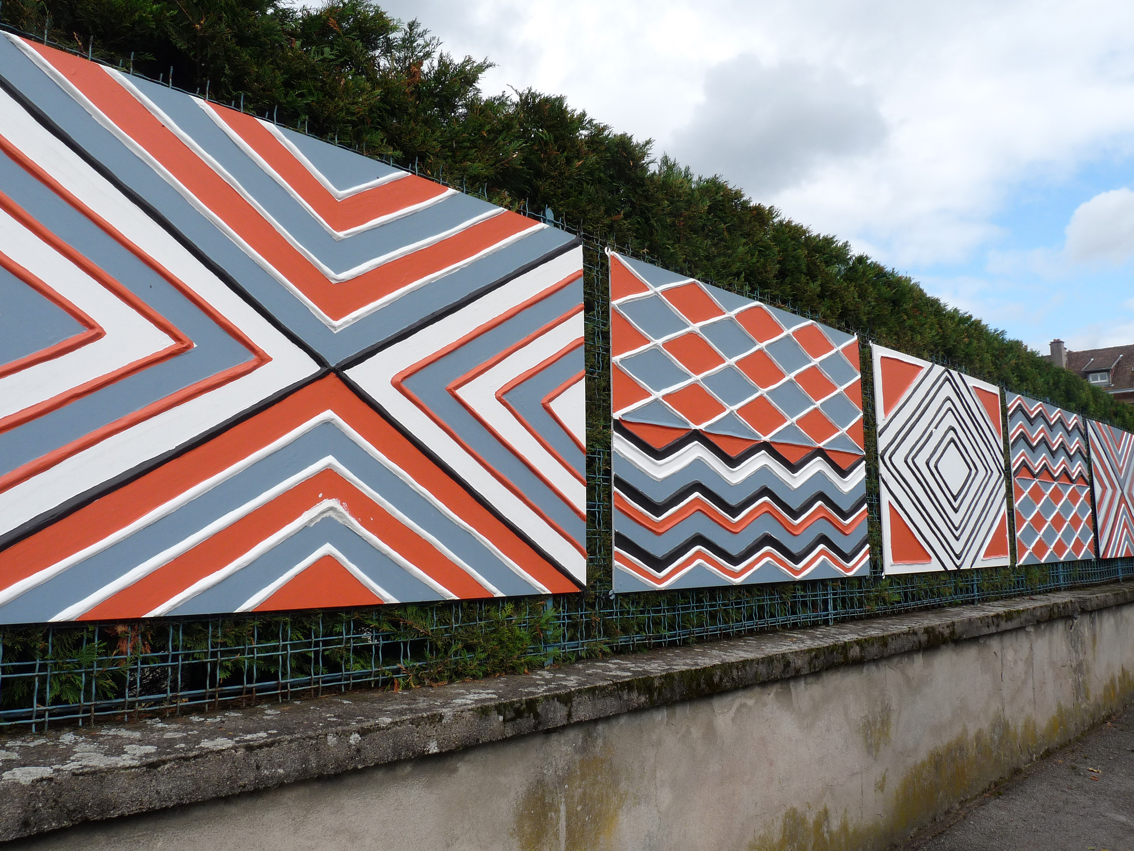 Fresque rwandaise Imigongo inaugurée à Saint-Dié-des-Vosges dans le cadre du 22e Festival international de géographie 2011